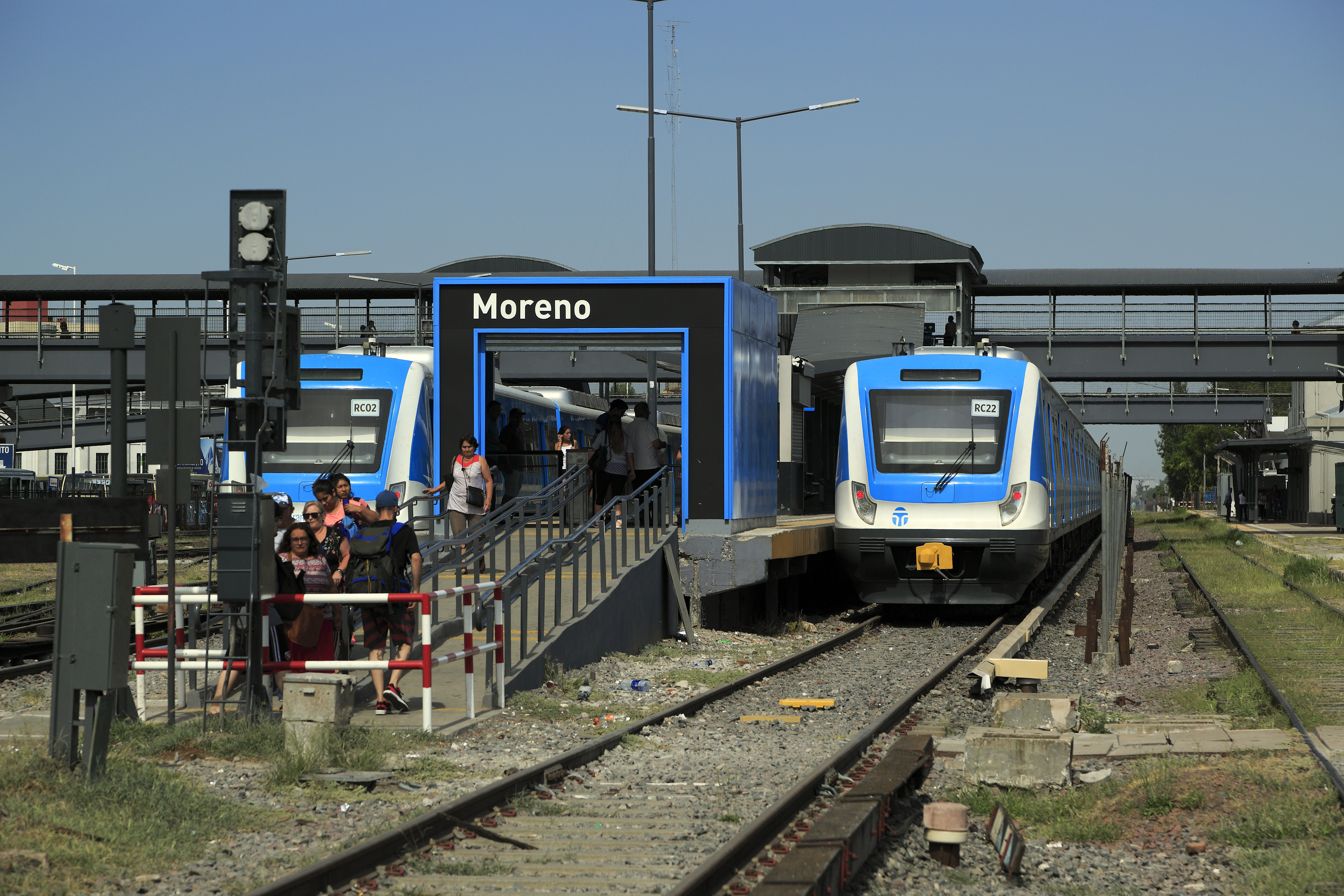 S-Bahnsteig vom Wegübergang Calle Pedro Martinez Melo. Wegen des Betriebswechsels und des starken Umsteigeverkehrs sind die Zu- und Abgänge ungewöhnlich leistungsfähig ausgefallen. Es gibt zwei Brücken und den stufenlosen Zu- und Abgang durch den Passimeter zum Wegübergang.Das Gleis ganz rechts ist das Stammgleis Once–Luján.